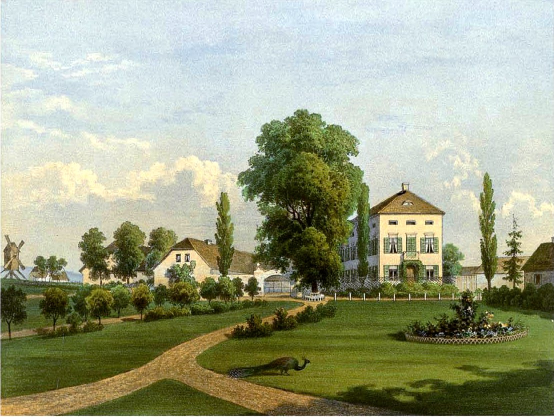 Rittergut Döllingen, Lithografie aus dem 19. Jahrhundert